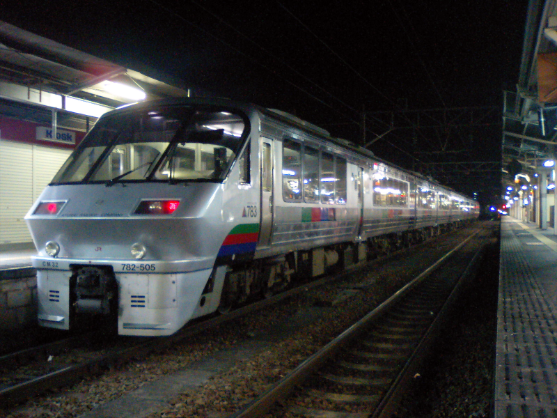 JR九州783系電車「ドリームにちりん」(上り、大分駅)